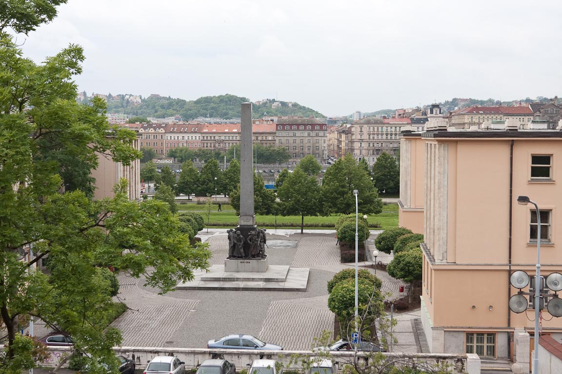 Zítkovy sady: Памятник участникам боёв 1914-18 гг. (Pomník Vítězným synům 1914 - 1918); 06.05.2009